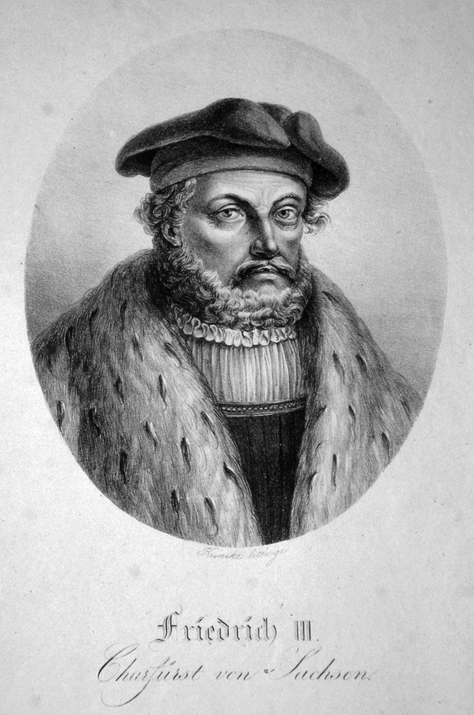 Friedrich III. von Sachsen (1463-1525), der Weise, Kurfürst, Lithographie von Adolph Friedrich Kunike, um 1820